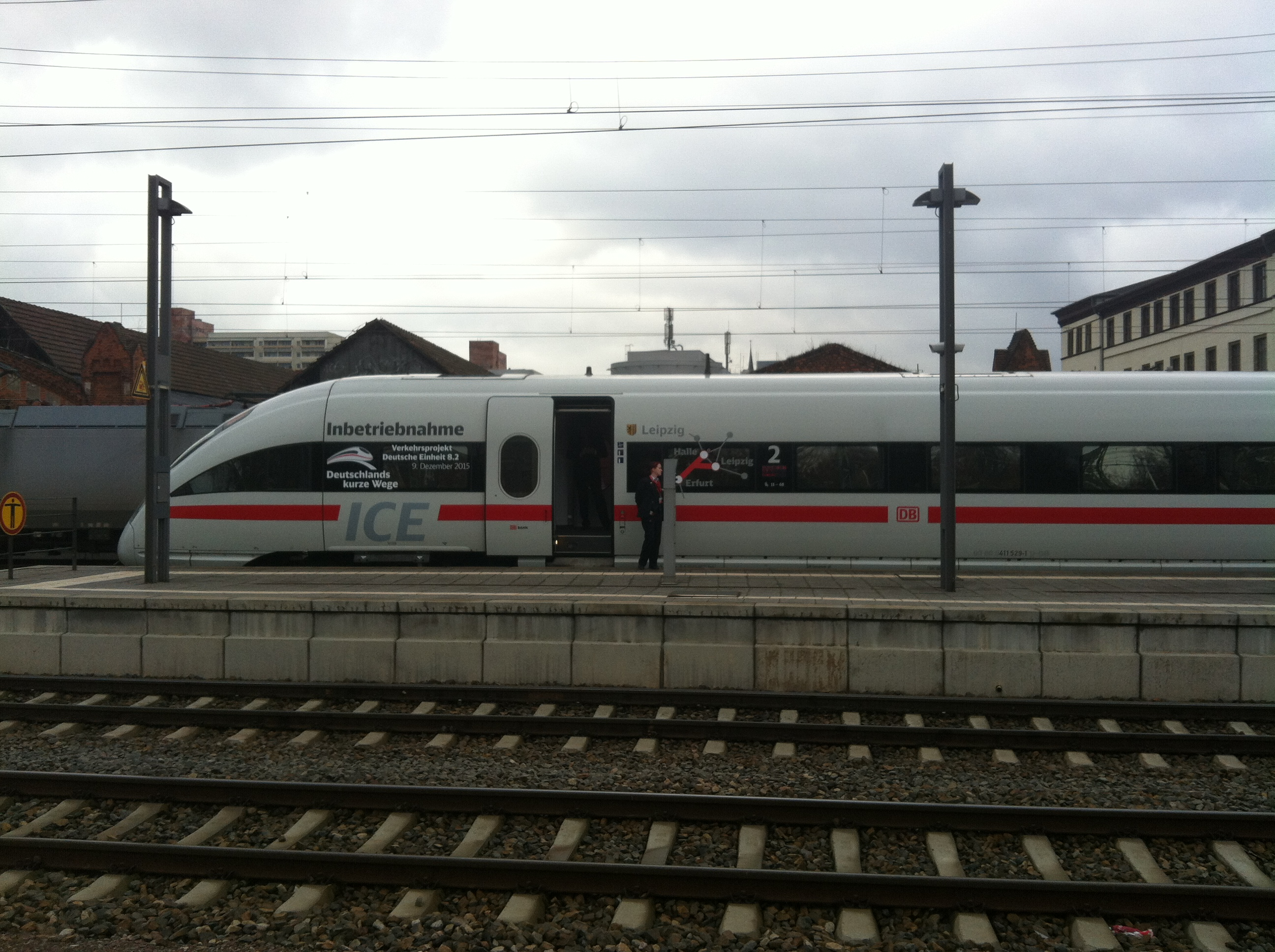 Der ICE-T-Triebzug 1129 Leipzig anlässlich der Eröffnungsfahrt für die Schnellfahrstrecke Erfurt–Halle/Leipzig